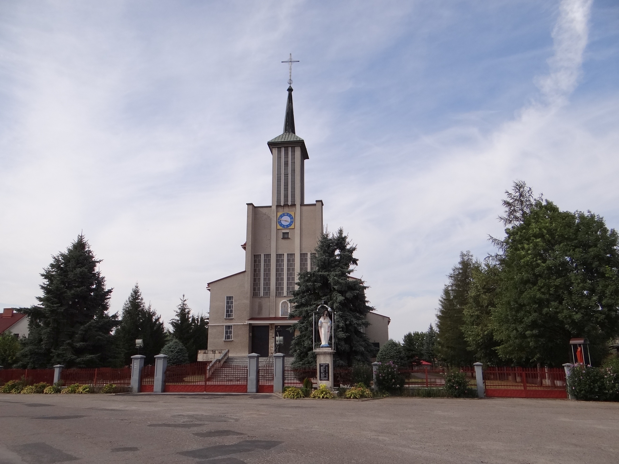 Biskupice Radłowskie 274 - rzymskokatolicki kościół parafialny p.w. MB Częstochowskiej